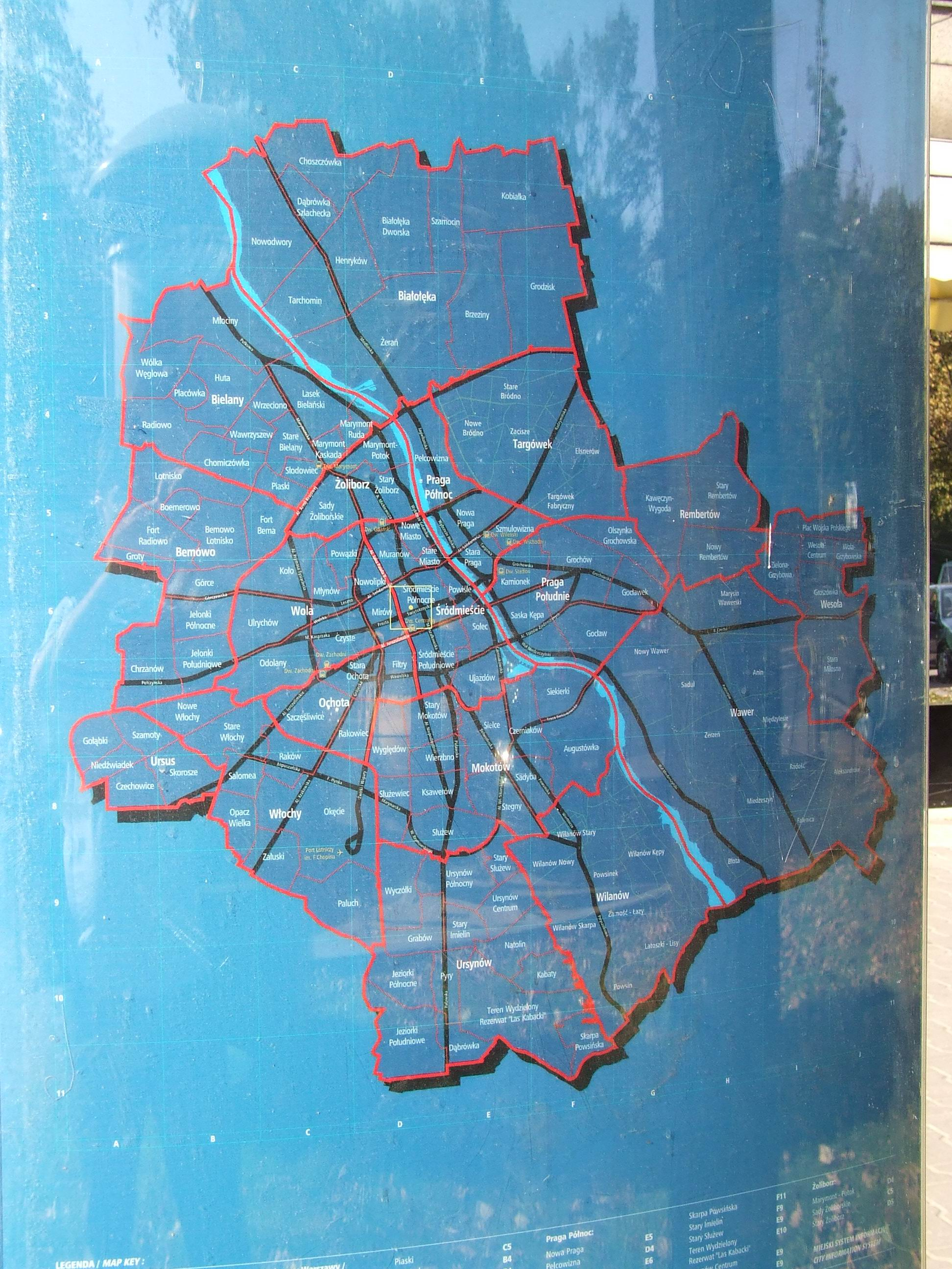 Mapa Warszawy - podział na rejony i dzielnice wg MSI